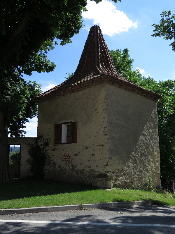 Tvrz, Řepice.